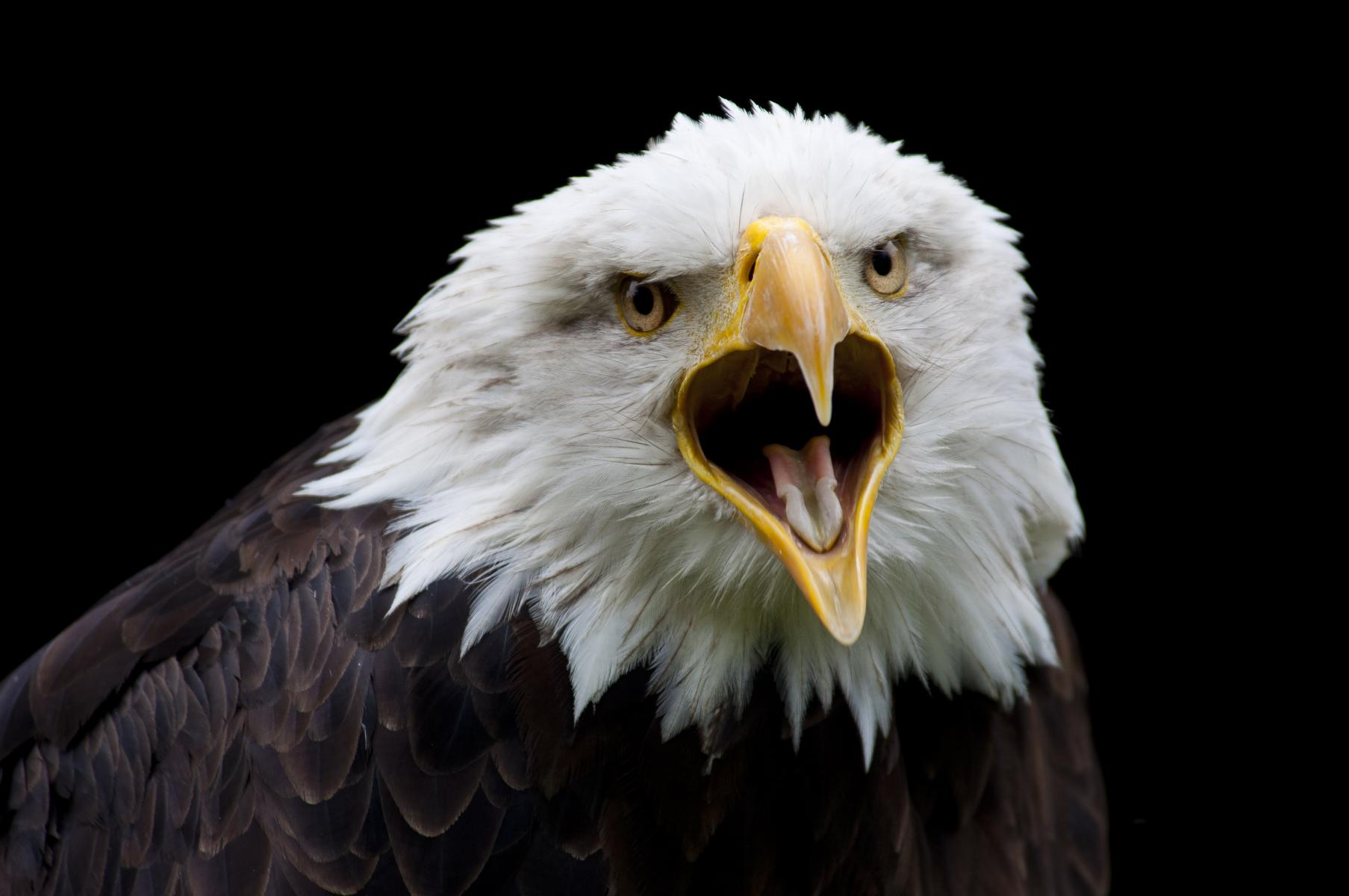 Weißkopfseeadler, Portrait